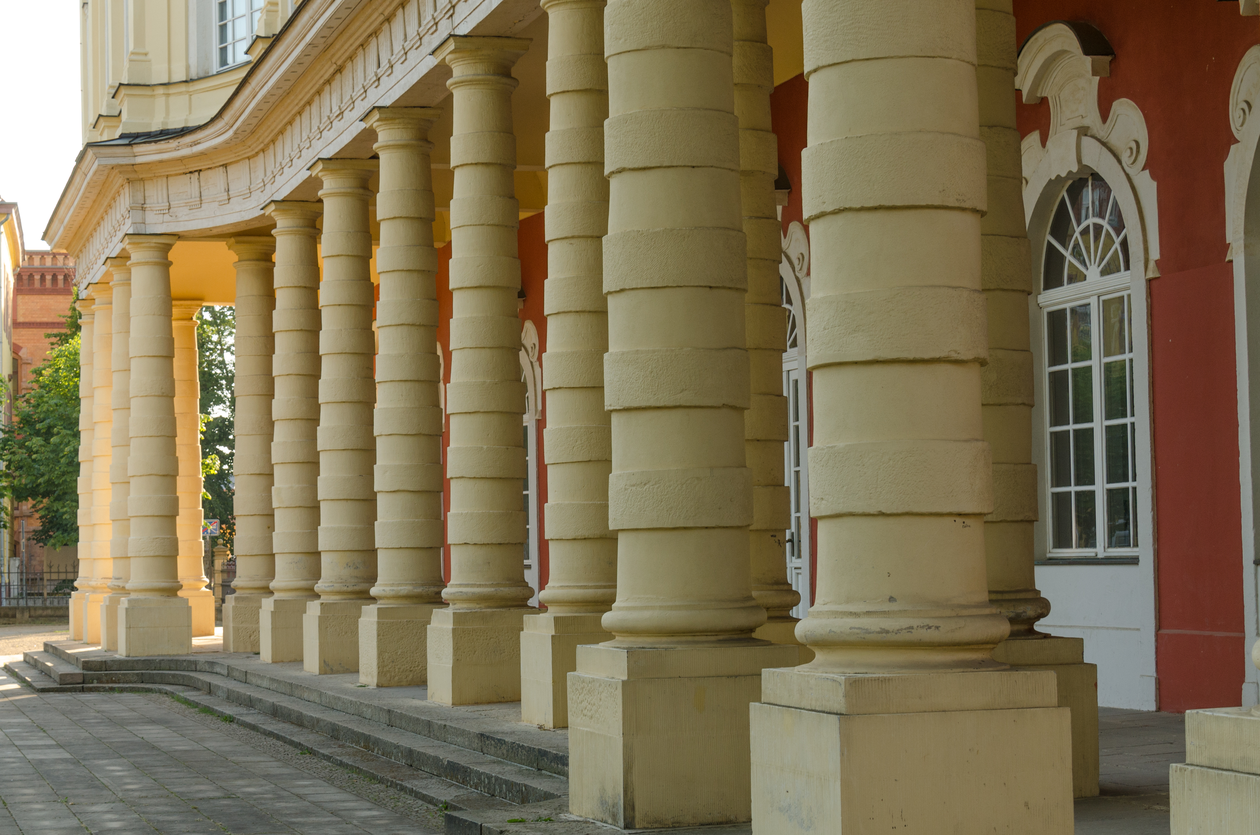 Merseburg, Oberaltenburg, Schloßgarten, Schloßgartensalon